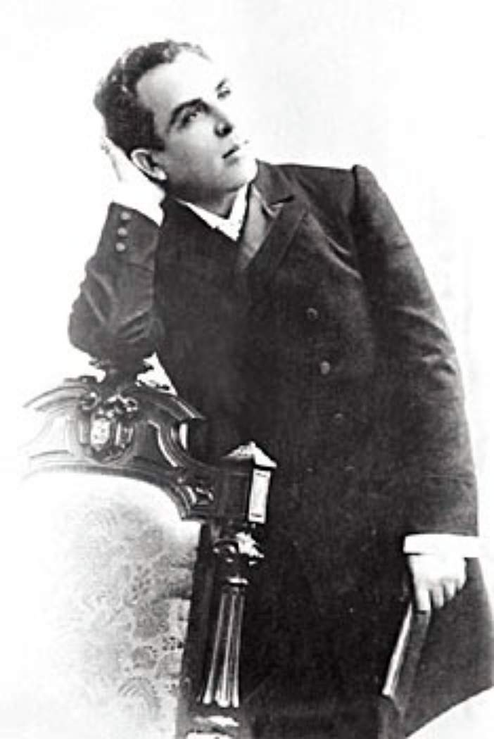 портрет А.Л.Вишневского, 1985